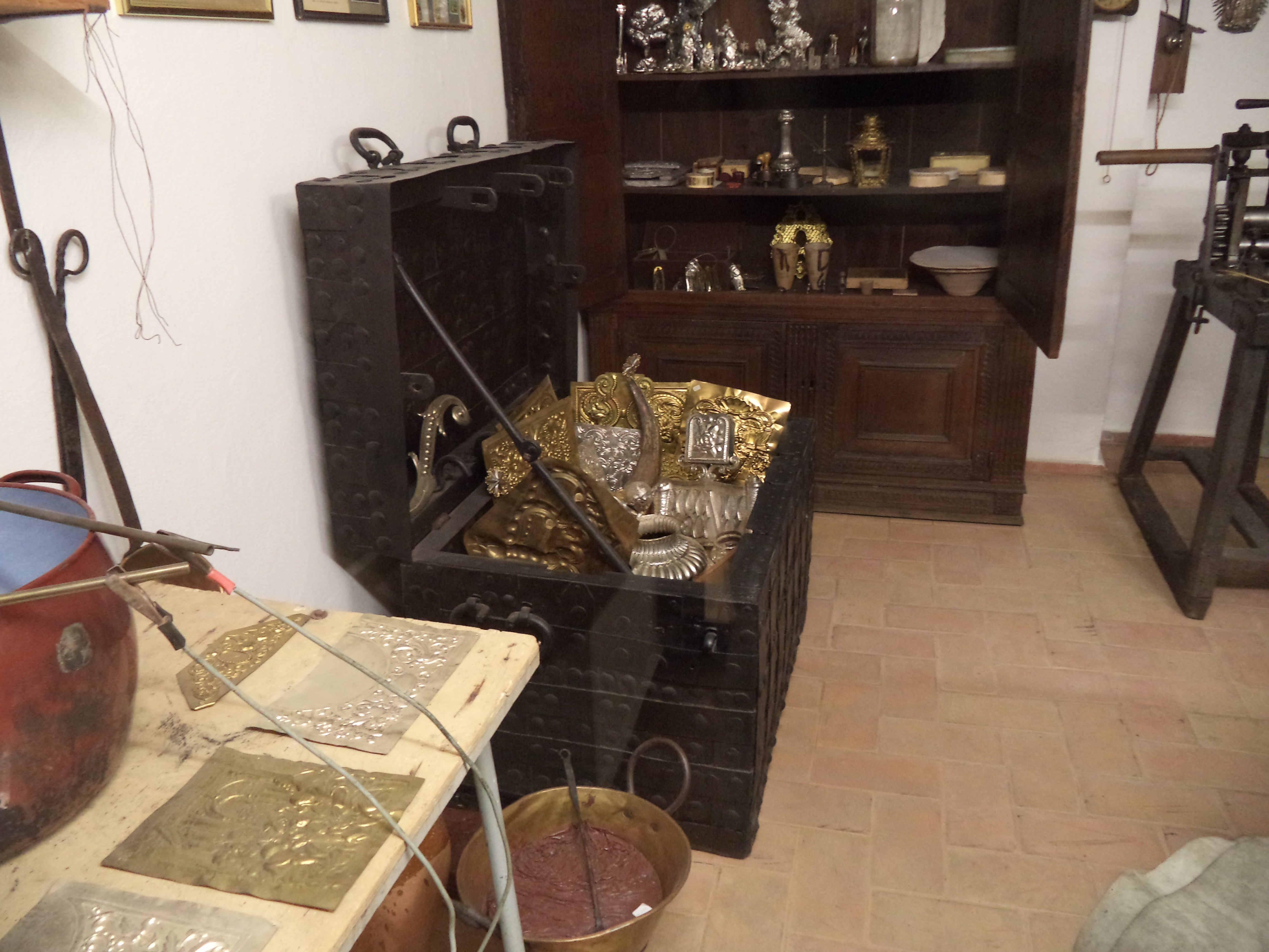 Arca de caudales para guardar metales preciosos. Taller del orfebre Fernando Marmolejo Camargo, expuesto en el Museo de Artes y Costumbres Populares de Sevilla.